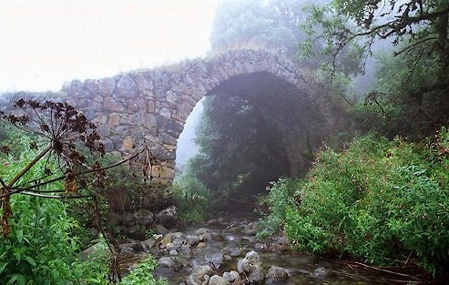 мост 4 века возле Капана 1/10.4